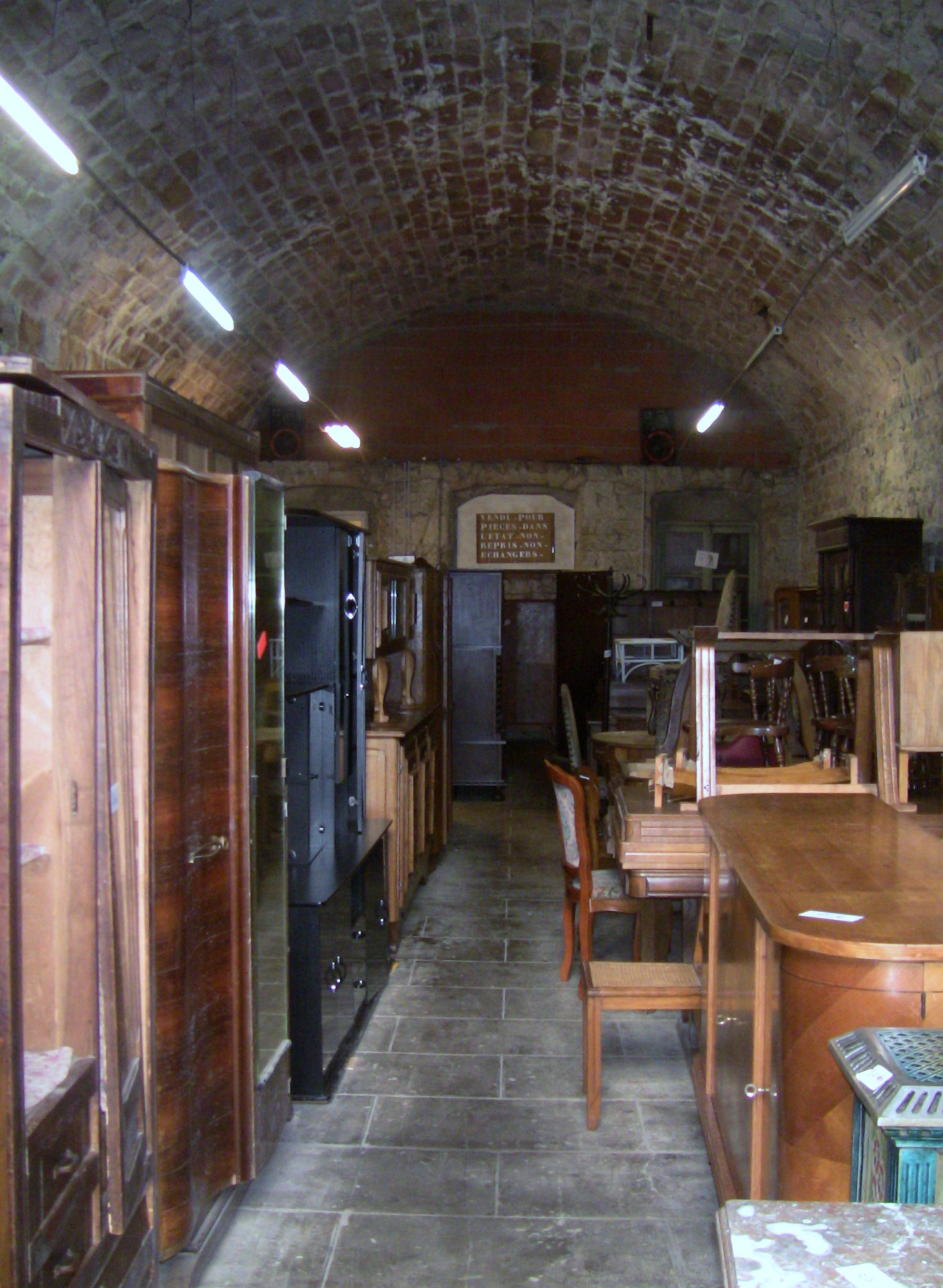 Un magasin à l'intérieur du fort de Planoise, à Besançon (Doubs, France).